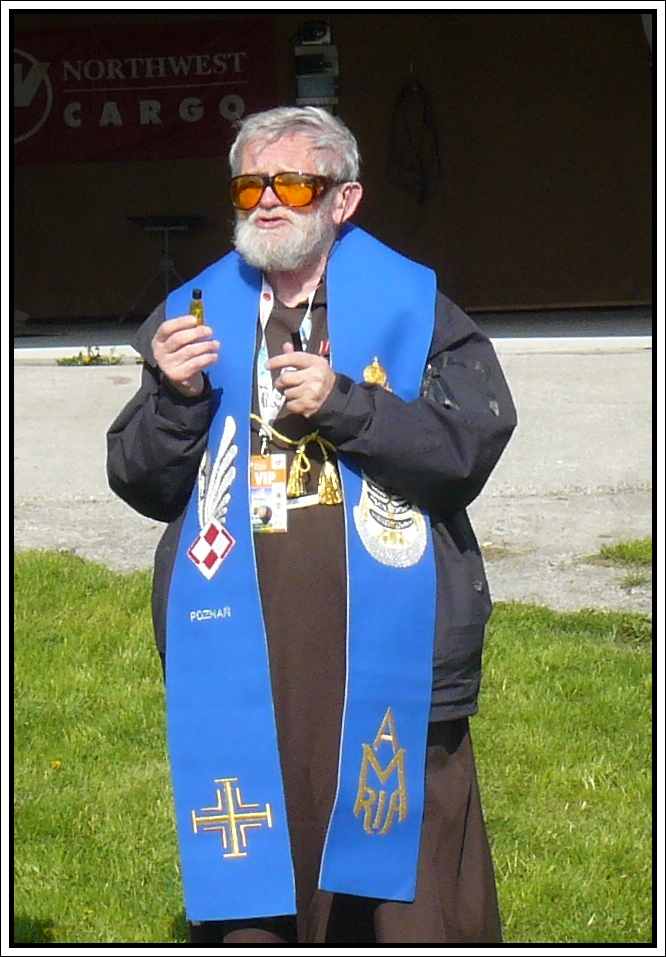 o.Dominik Orczykowski